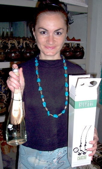 Eine Georgierin präsentiert stolz einen prämierten Tschatscha